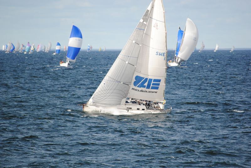 En av deltagarna kommer snart i mål lite före de övriga